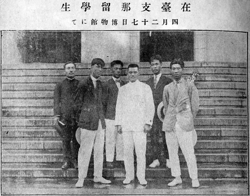 中文（台灣）: 大正10年/畢業紀念冊